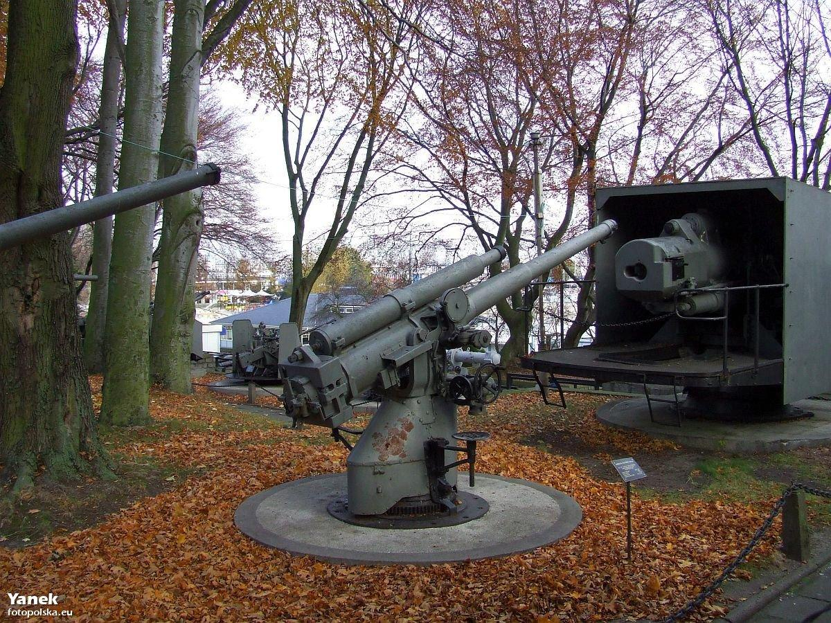 Armata wz 17 kal. 100mm z okrętu podwodnego.